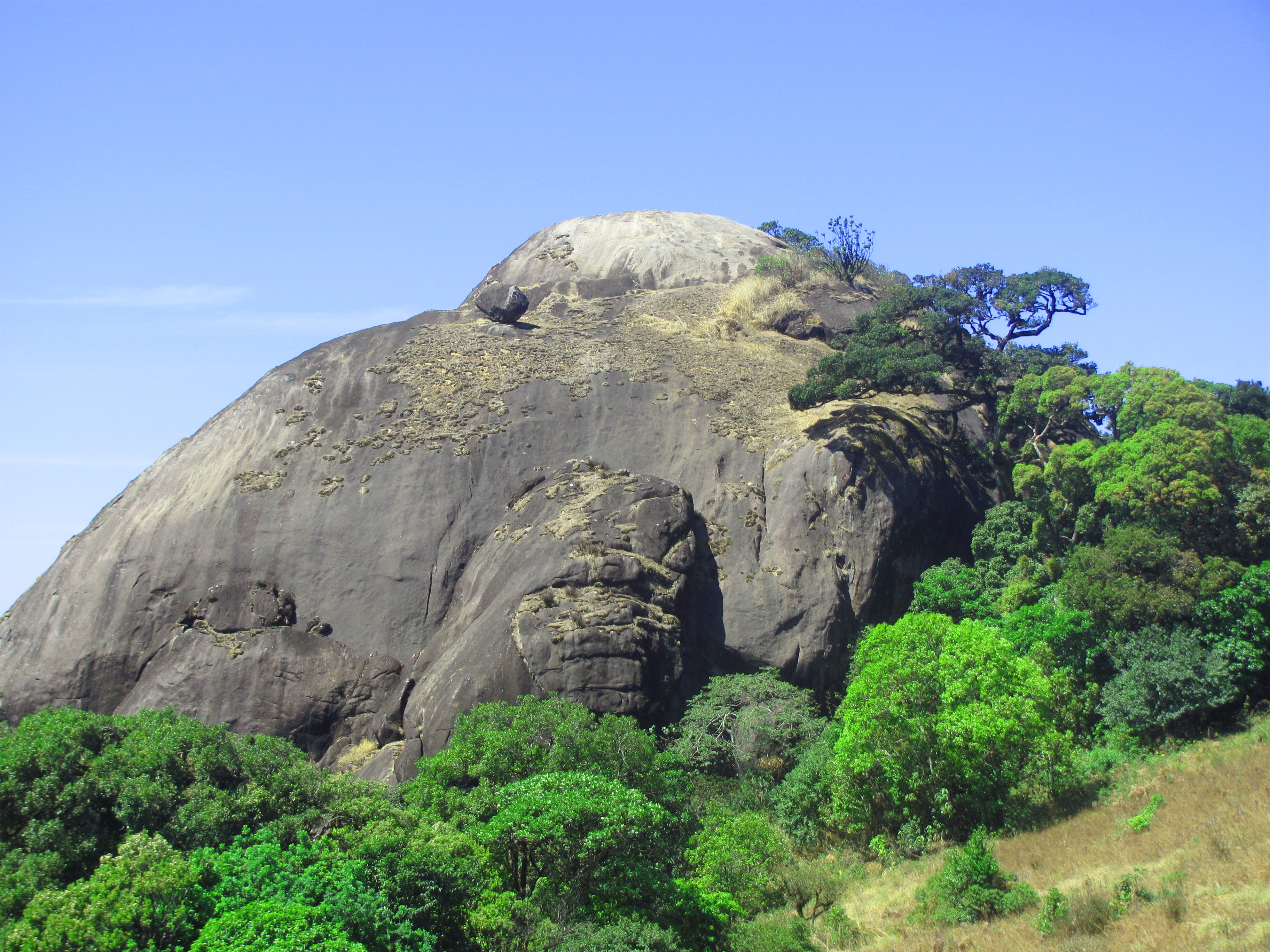 പക്ഷിപാതാളം